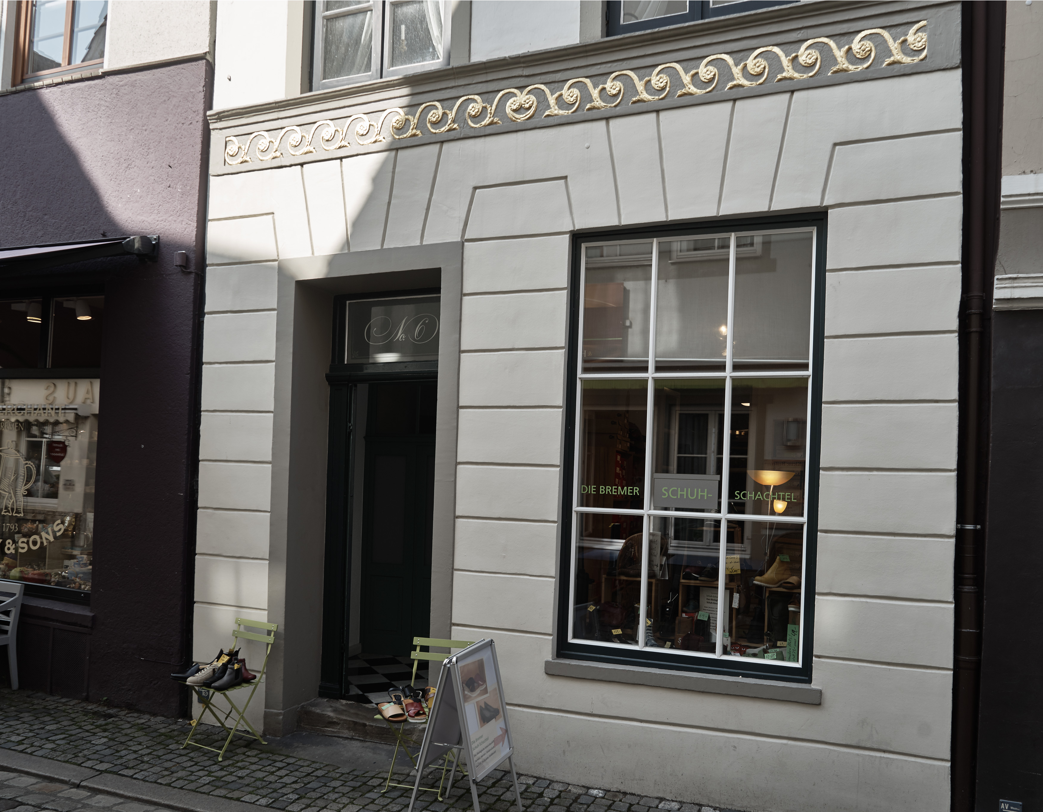 Wohnhaus in Bremen, Am Landherrnamt 6Das abgebildete Objekt ist ein geschütztes Kulturdenkmal in der Freien Hansestadt Bremen, mit der Nr. 0064 beim Landesamt für Denkmalpflege registriert.